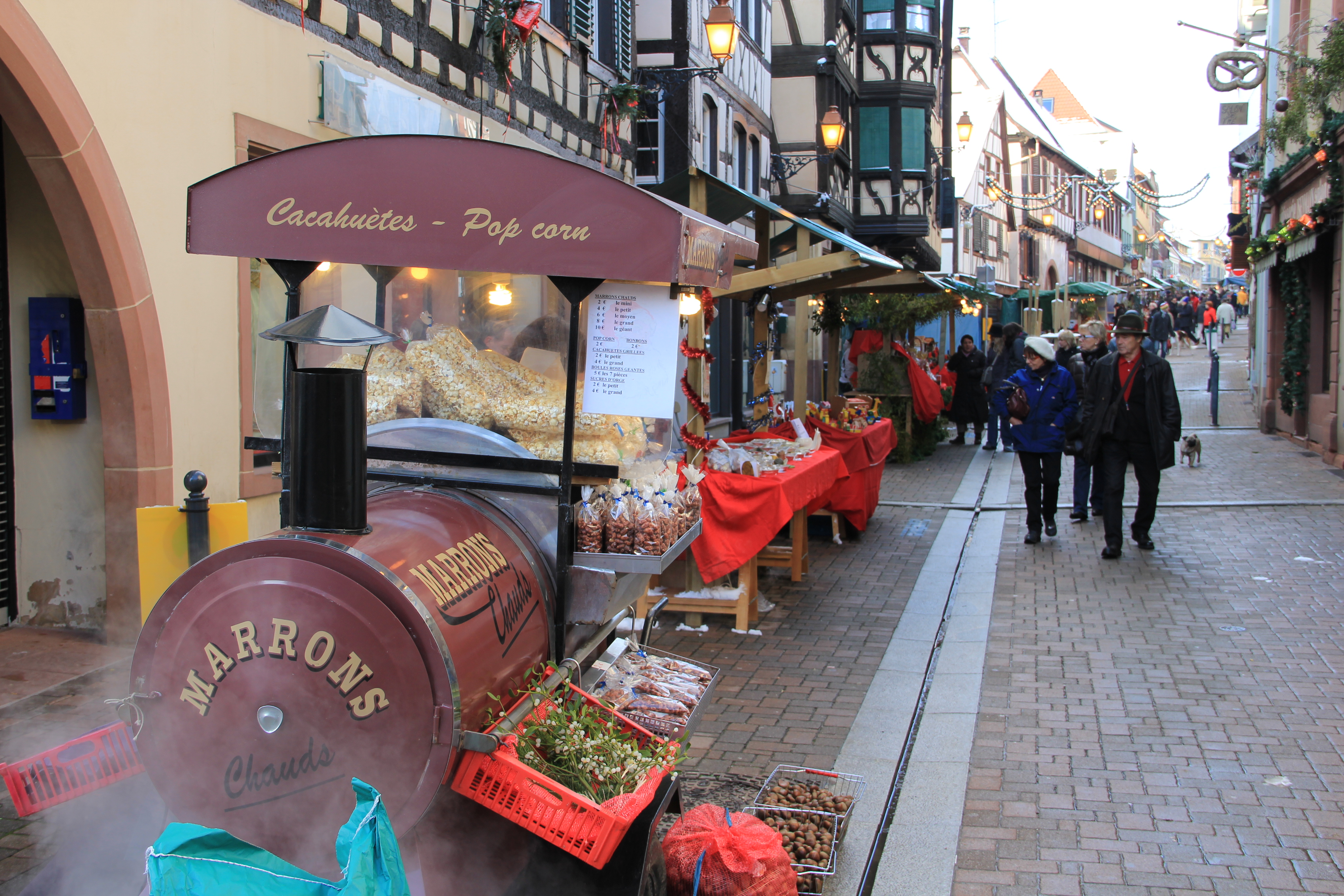 Grand rue de Bouxwiller lors du marché de Noël de décembre 2012.